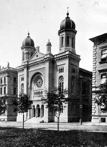 Synagoga v Mariánských Lázních na dobové pohlednici